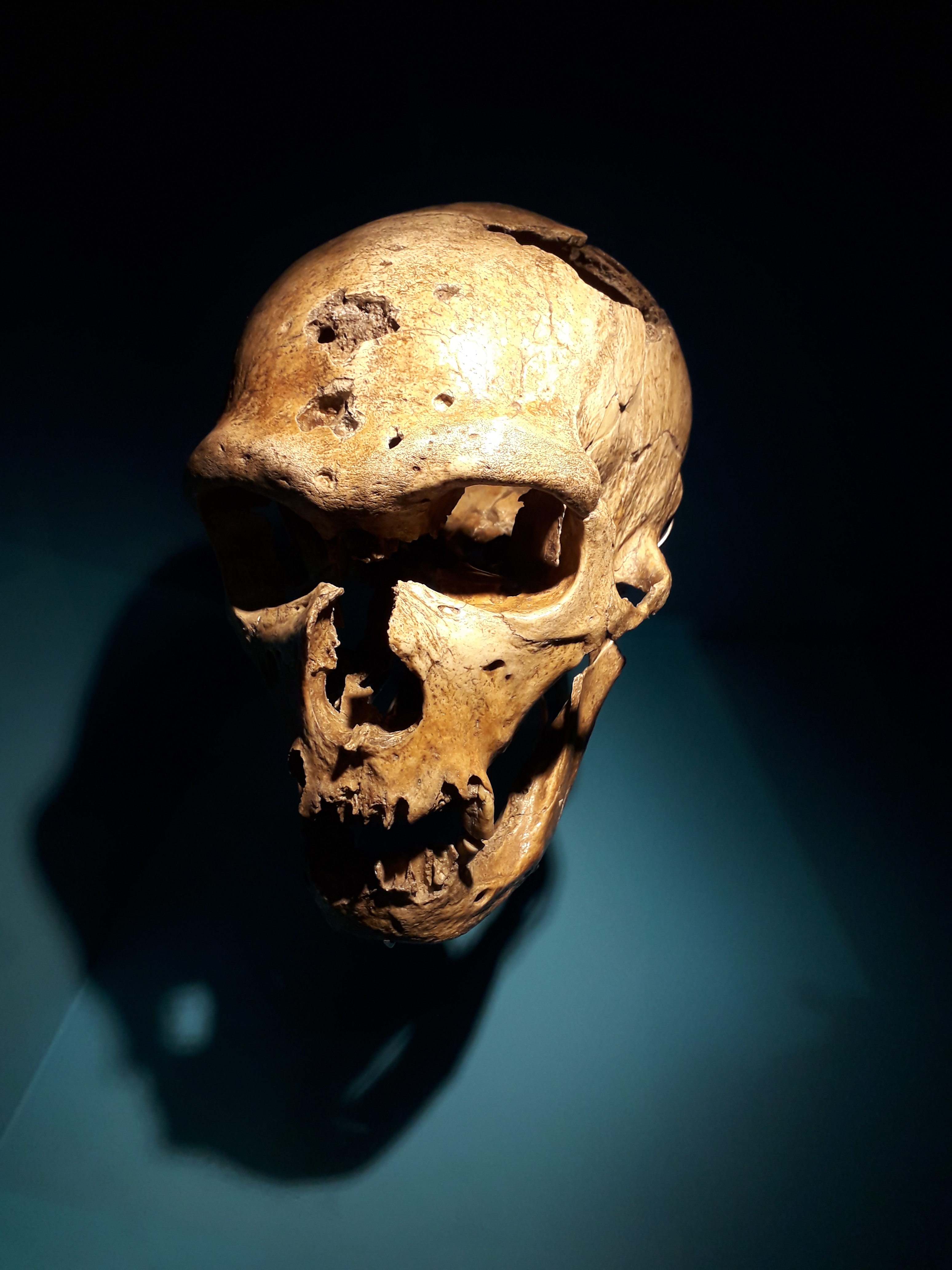 Crâne et mandibule de l'homme de La Chapelle-aux-Saints. Os fossiles. La Chapelle-aux-Saints, France. Date : entre -57 000 et -45 000. Collections du Muséum national d'histoire naturelle de Paris. Photographié à l'exposition "Néandertal, l'expo" au musée de l'Homme à Paris en avril 2018.